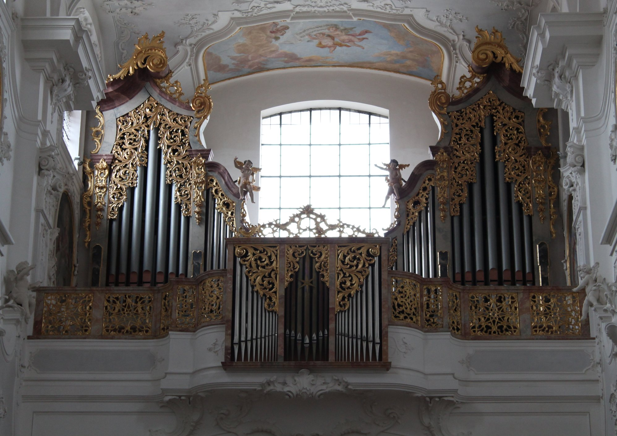 Orgel der Dominikanerkirche in Landshut (1965, Gerhard Schmid, V/75)